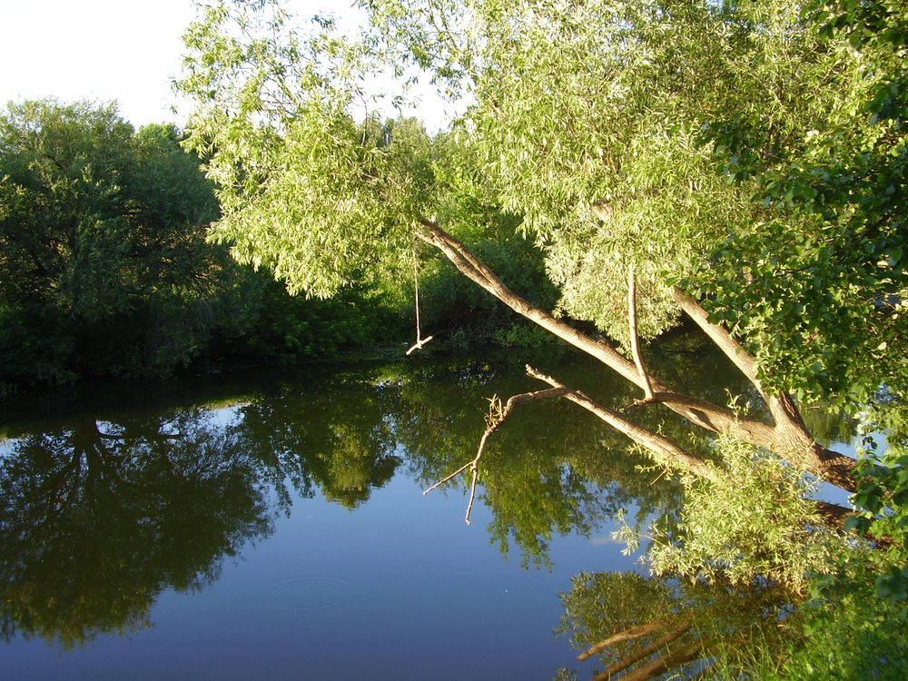 Река Малая Кокшага выше города Йошкар-Ола.